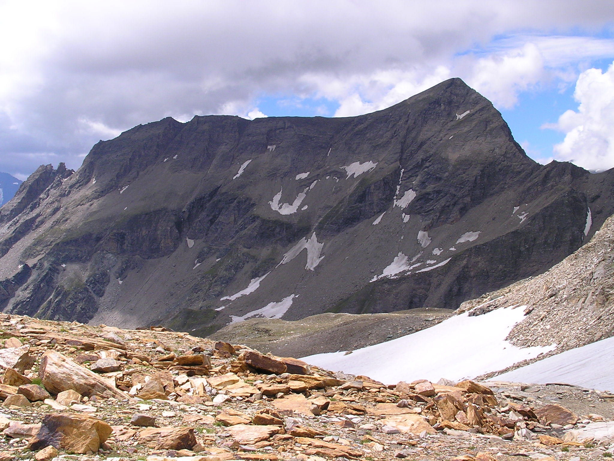 Die Racherin (rechts) von Nordosten aus gesehen